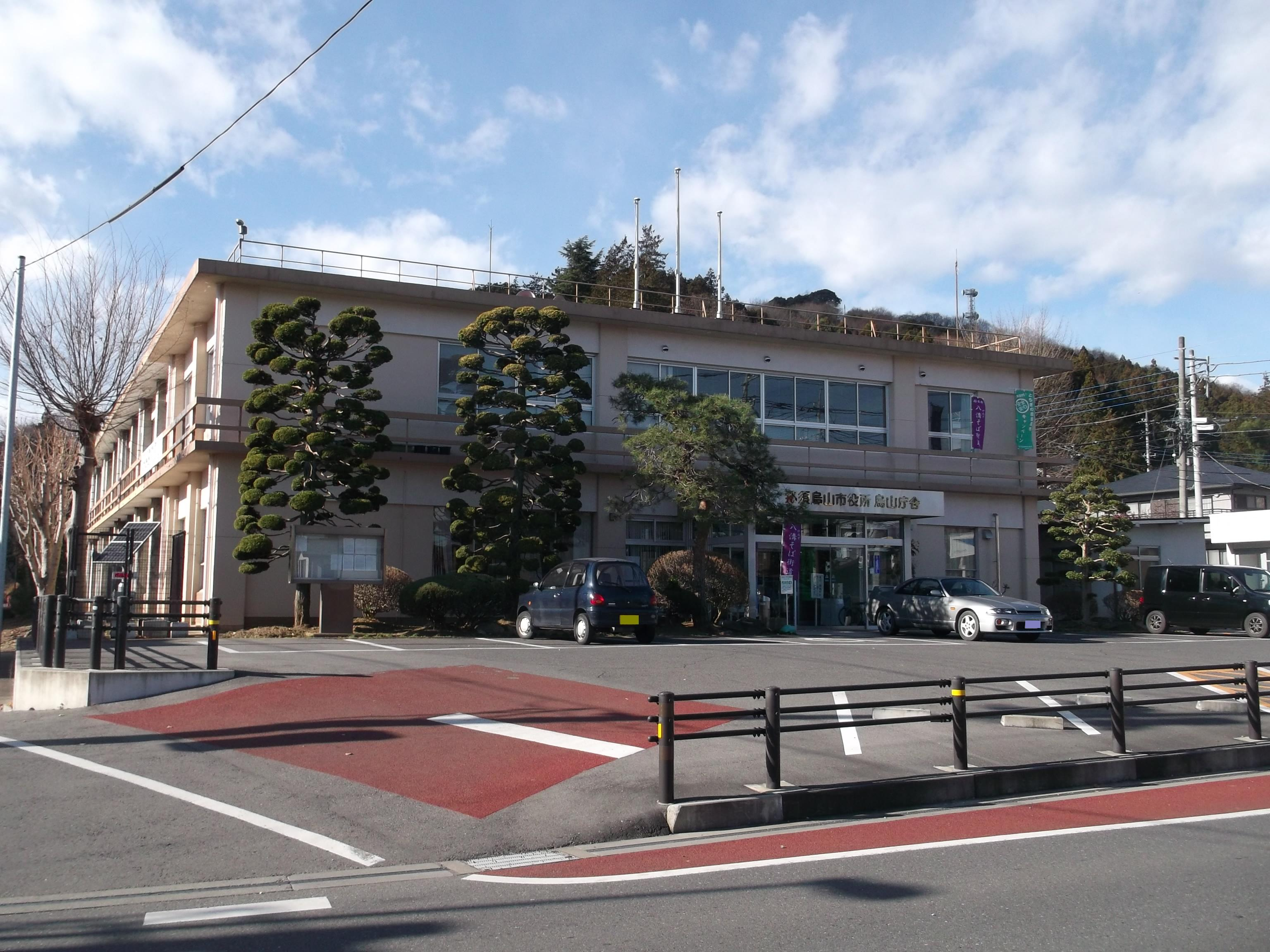 栃木県那須烏山市役所